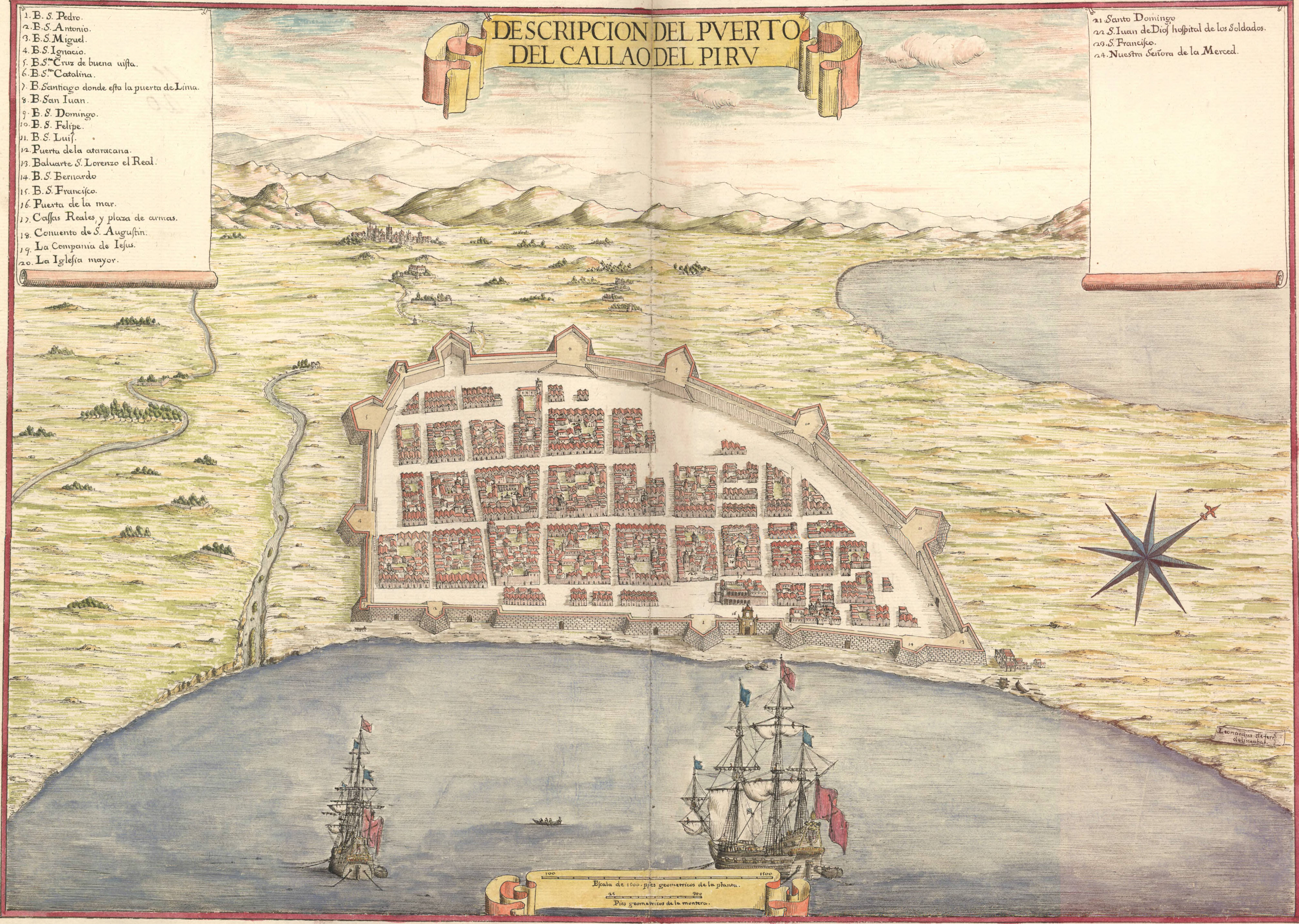 Callao, Hafenstadt in Peru. Darstellung aus dem Atlas des Marquis von Heliche.